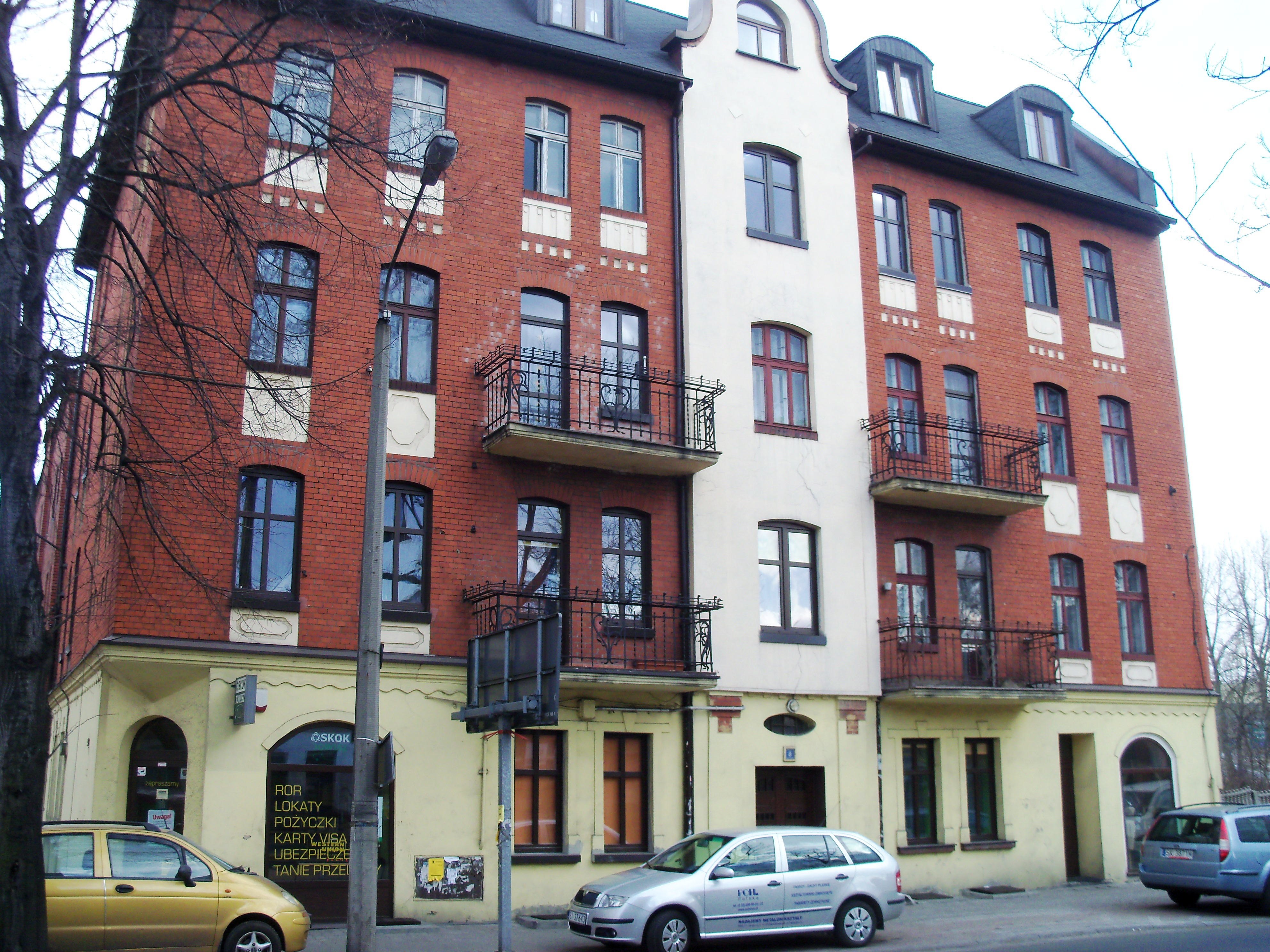 Dziewięcioosiowa, trzypiętrowa kamienica przy ul. Strzelców Bytomskich 8 w Katowicach - Dąbrówce Małej